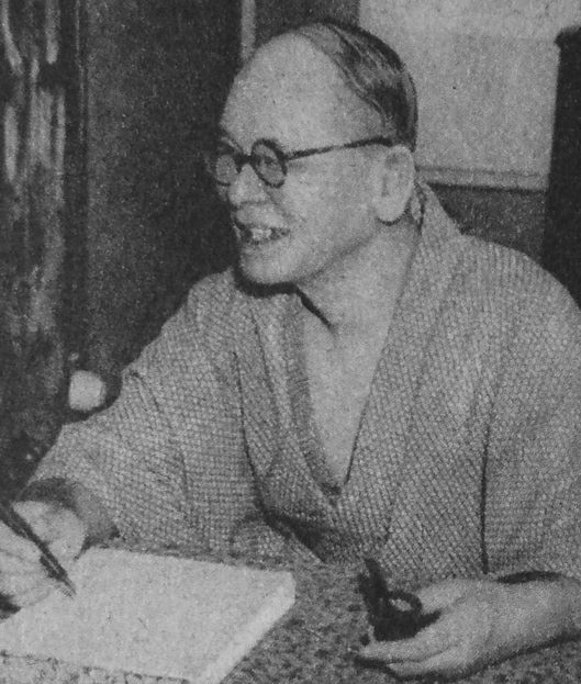 中西伊之助